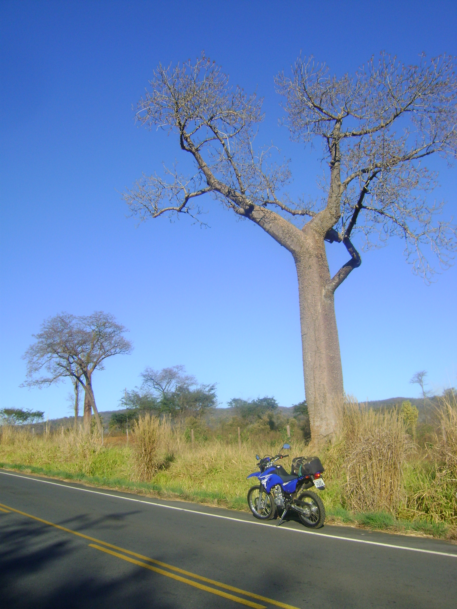 Indivíduo de Barriguda, Cavanillesia umbellata (syn. Cavanillesia arborea), na Rodovia BR-135.